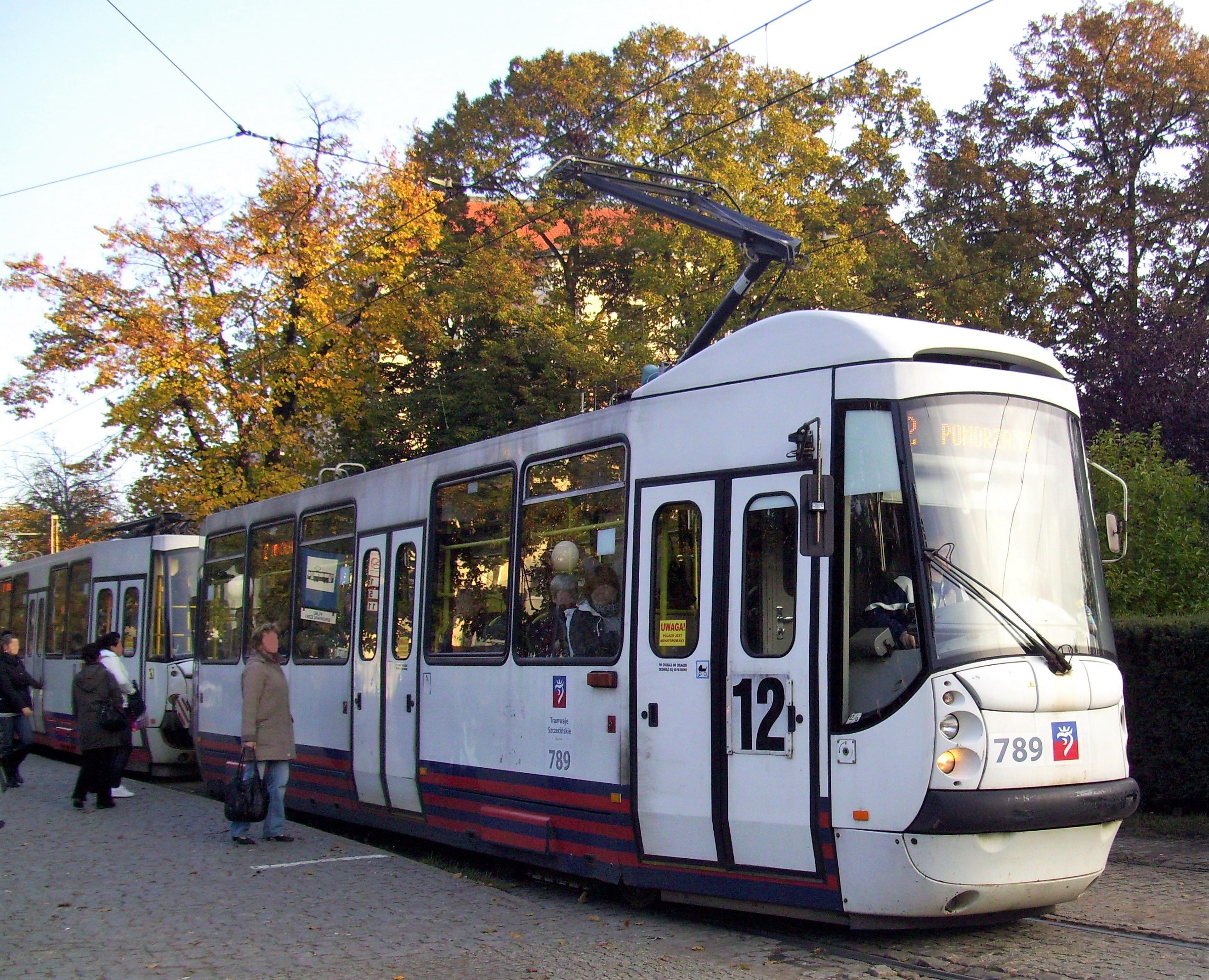 Tramwaj 105N2k/2000 w Szczecinie